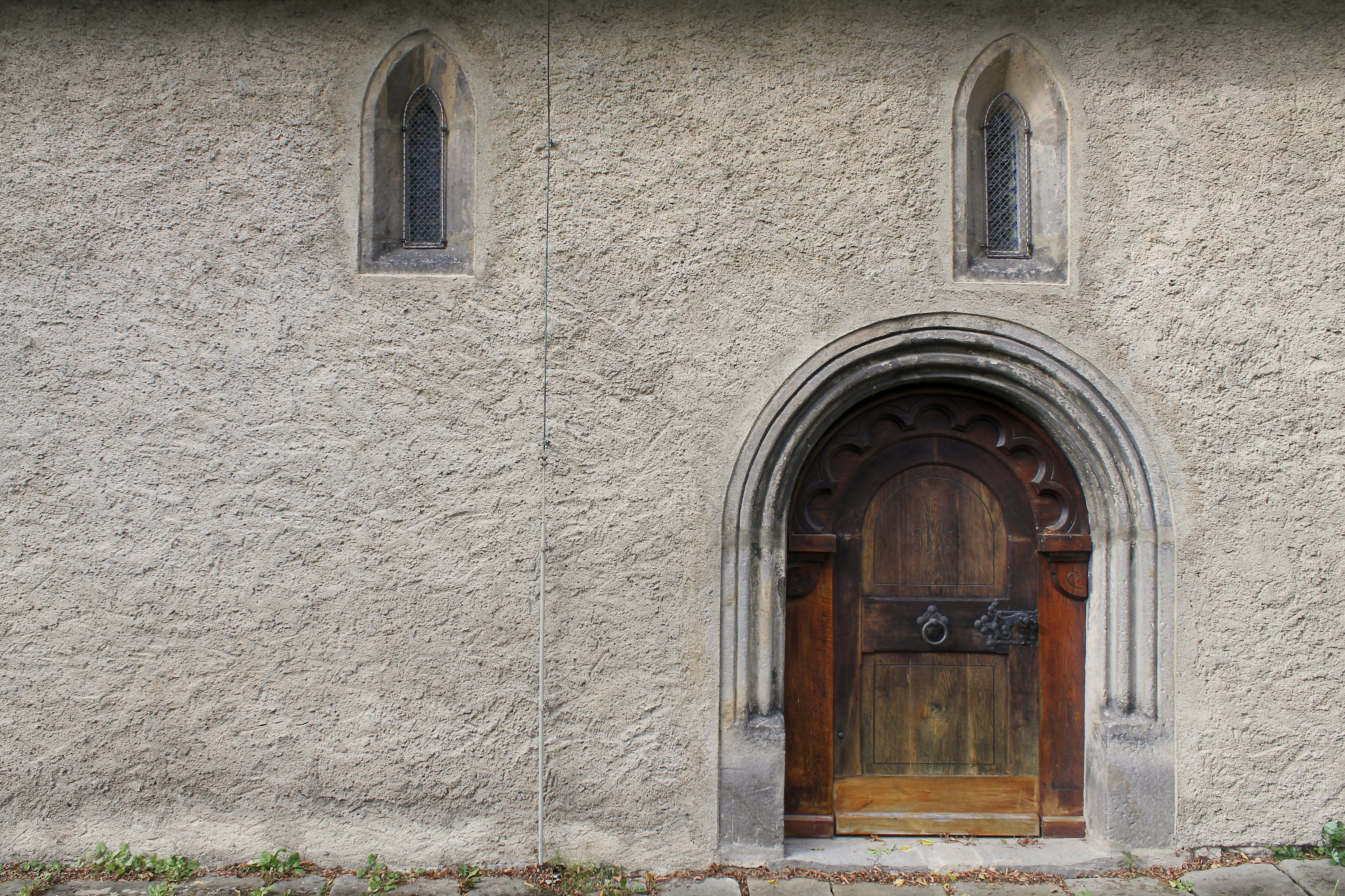 Původní románský portál (jižní) kostela sv. Jana Křtitele v Turnově